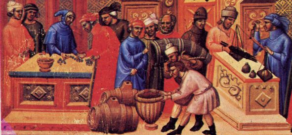 Ufficio contabile medievale per prestiti e finanziamenti